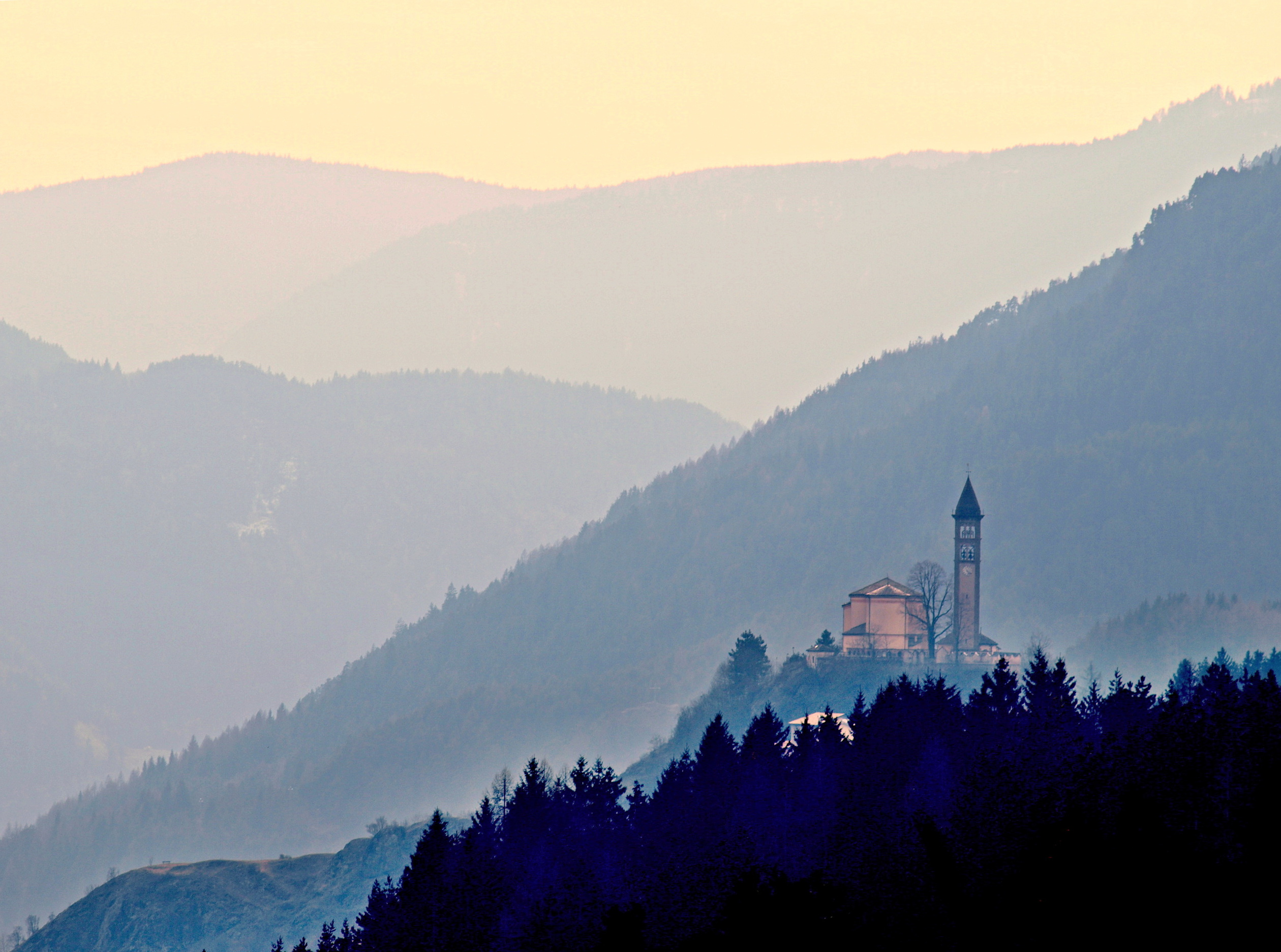 Carano a sv. Mikuláš